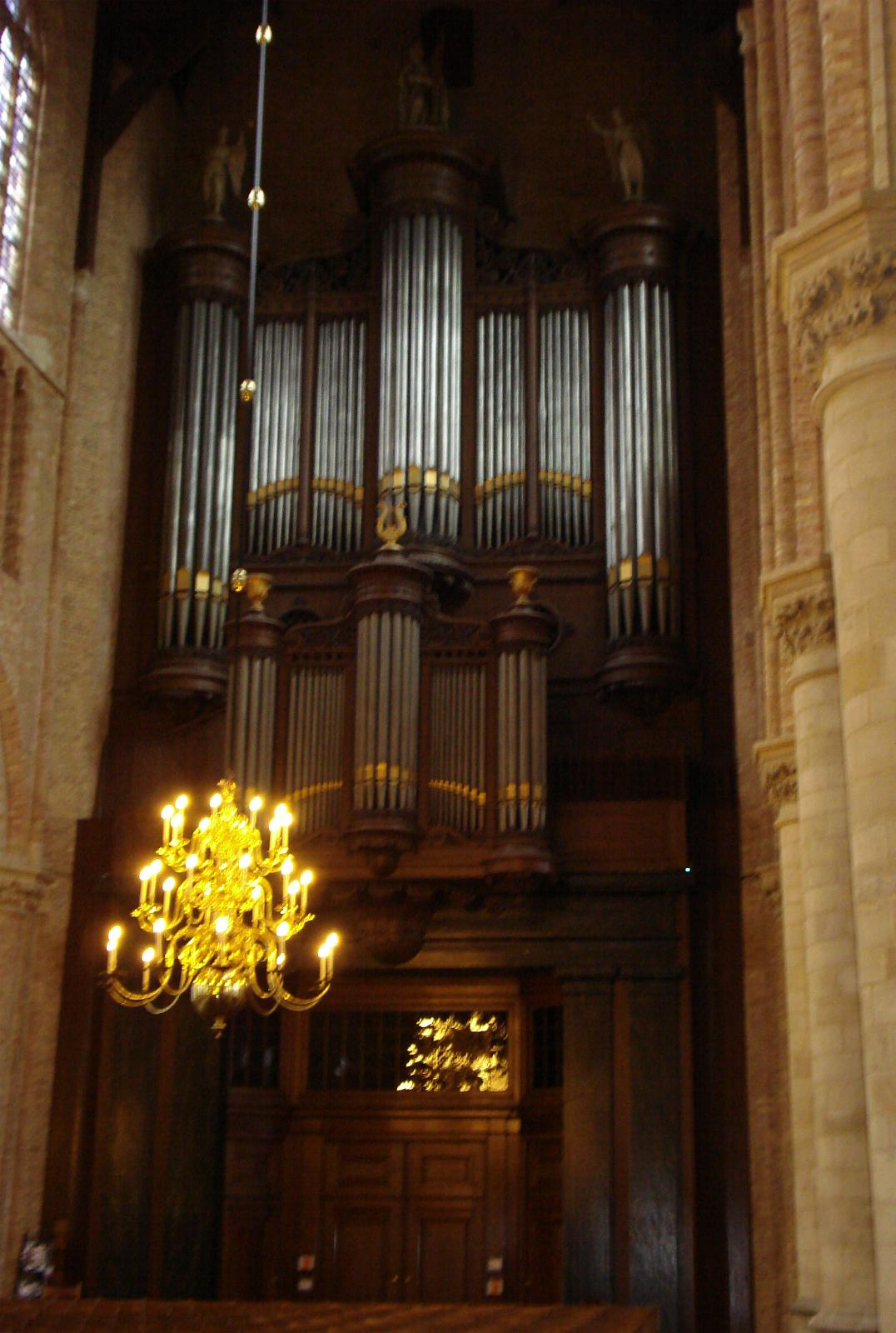 Delft, Nieuwe Kerk. Orgel.